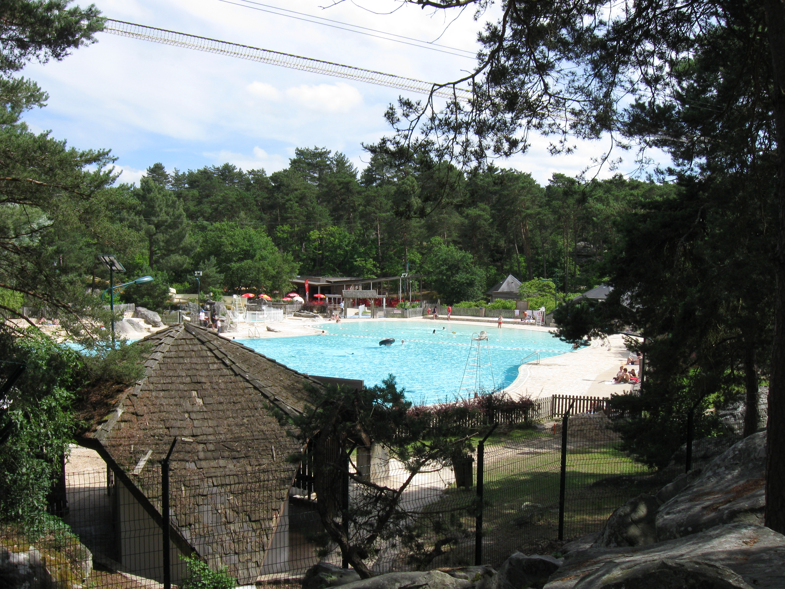 Base de loisirs de Buthiers. (département de la Seine et Marne, région Île-de-France).